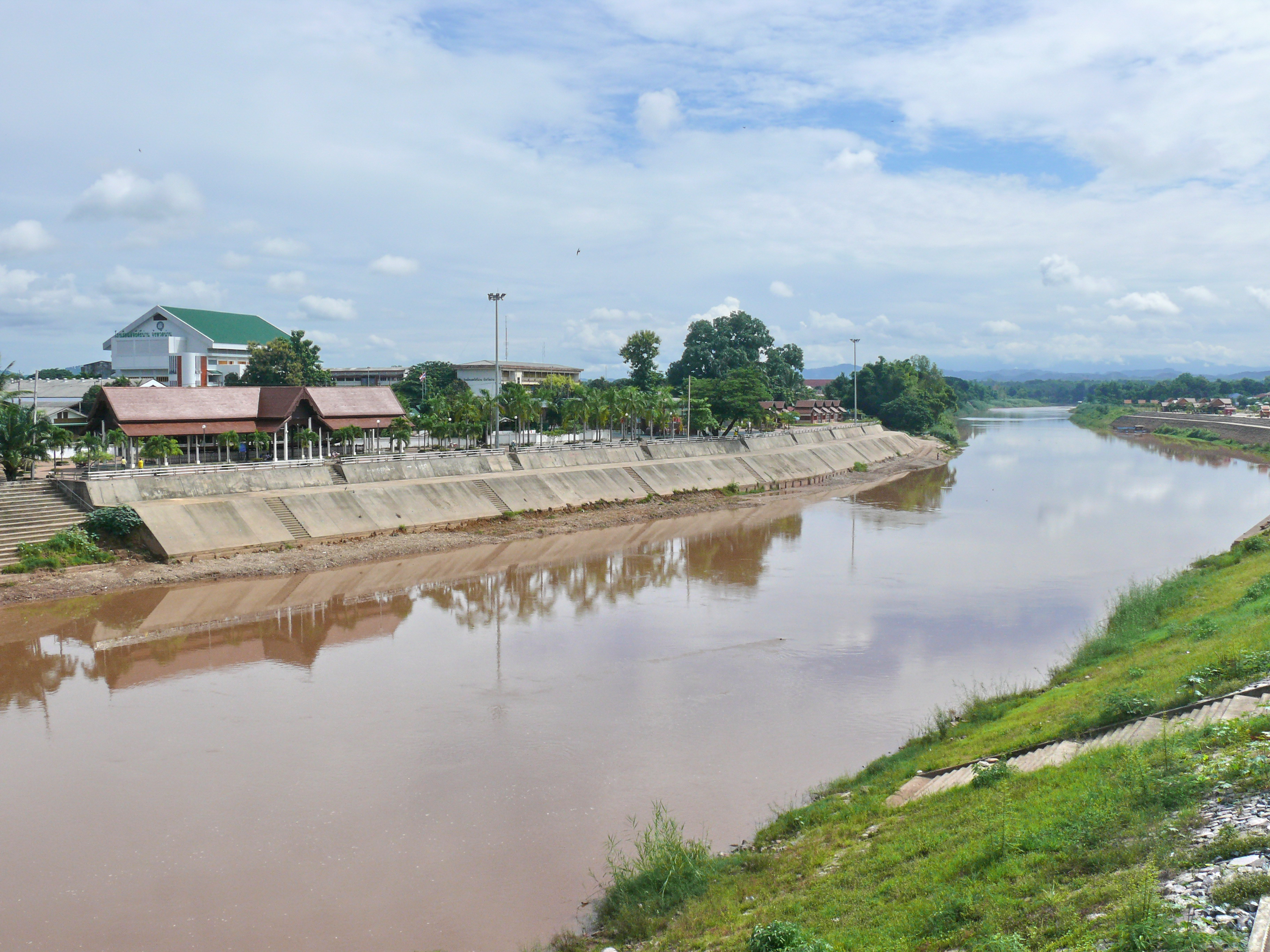 La rivière Nan à Nan, Thailande